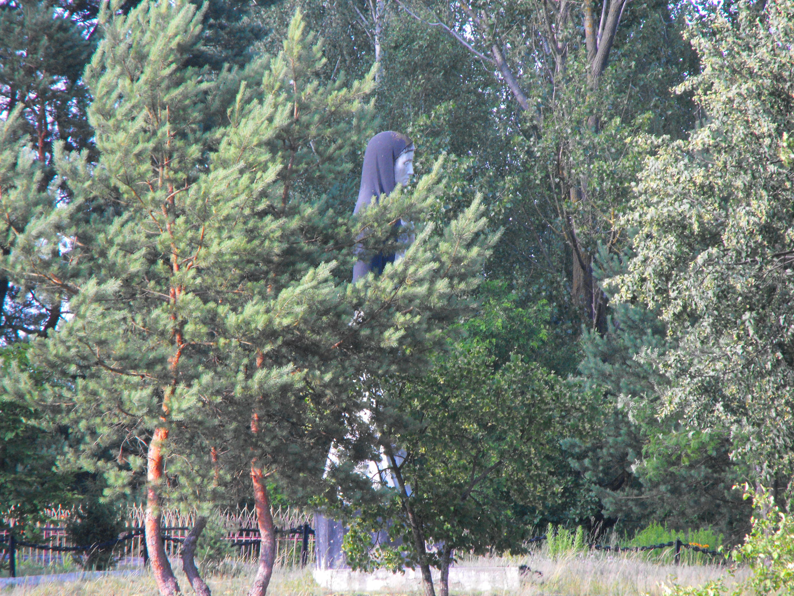 Памятник на на могиле более 1 800 убитых 14 августа 1942 года евреев - узников гетто в деревне Ленин Житковичского райна